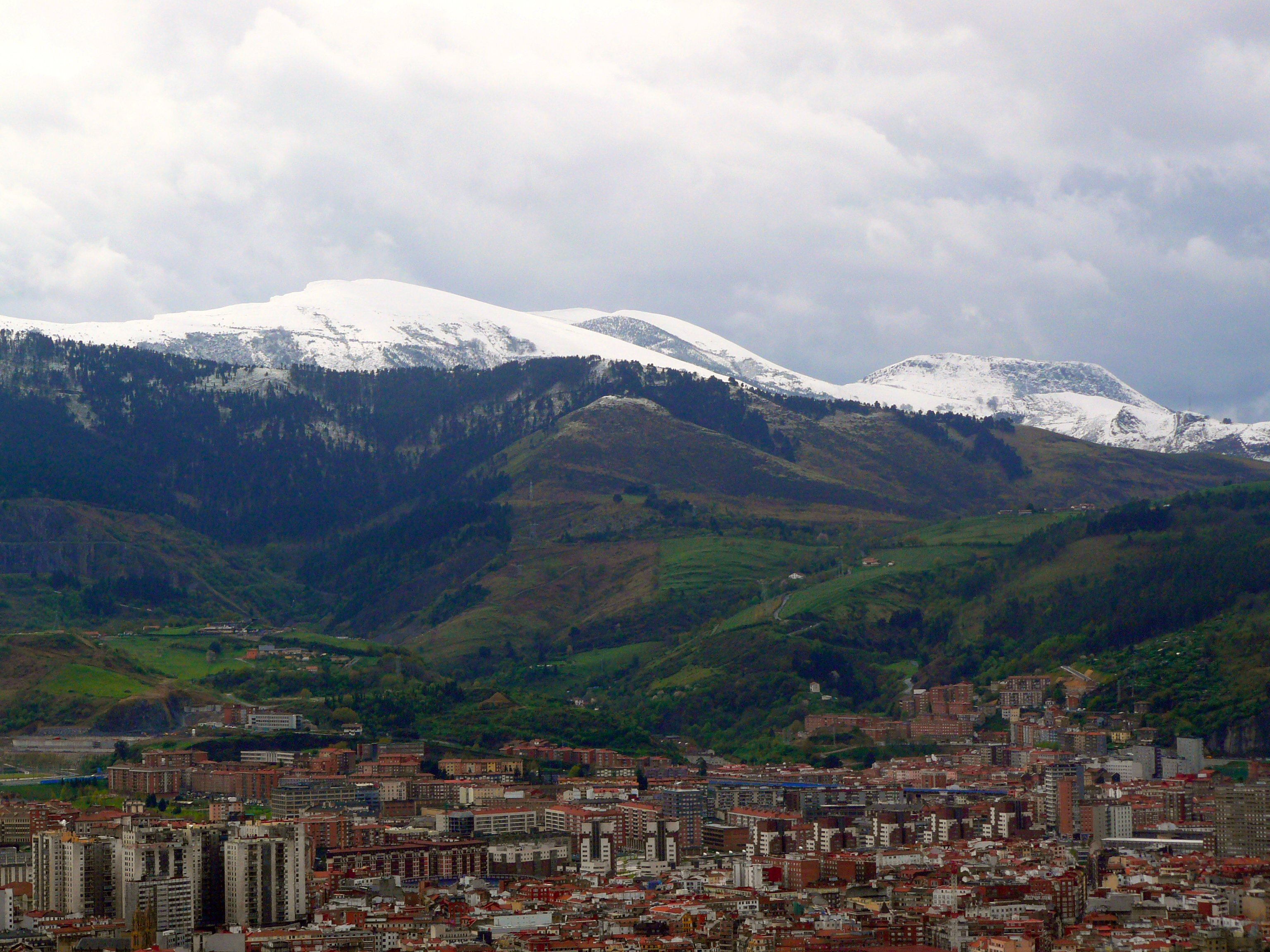 Montes nevados en Bilbao, España.